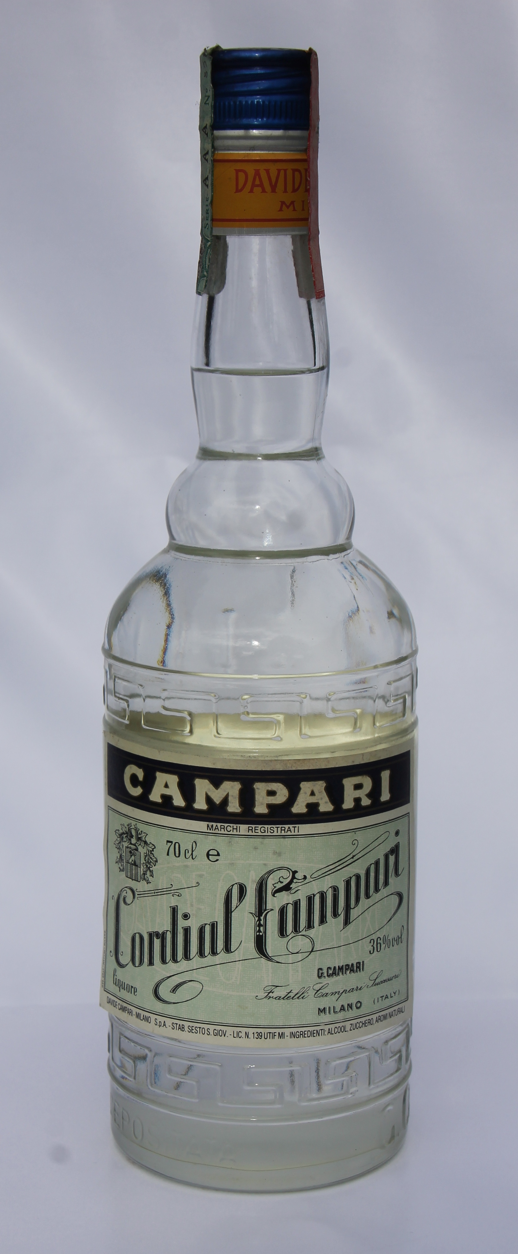 Campari-Variante